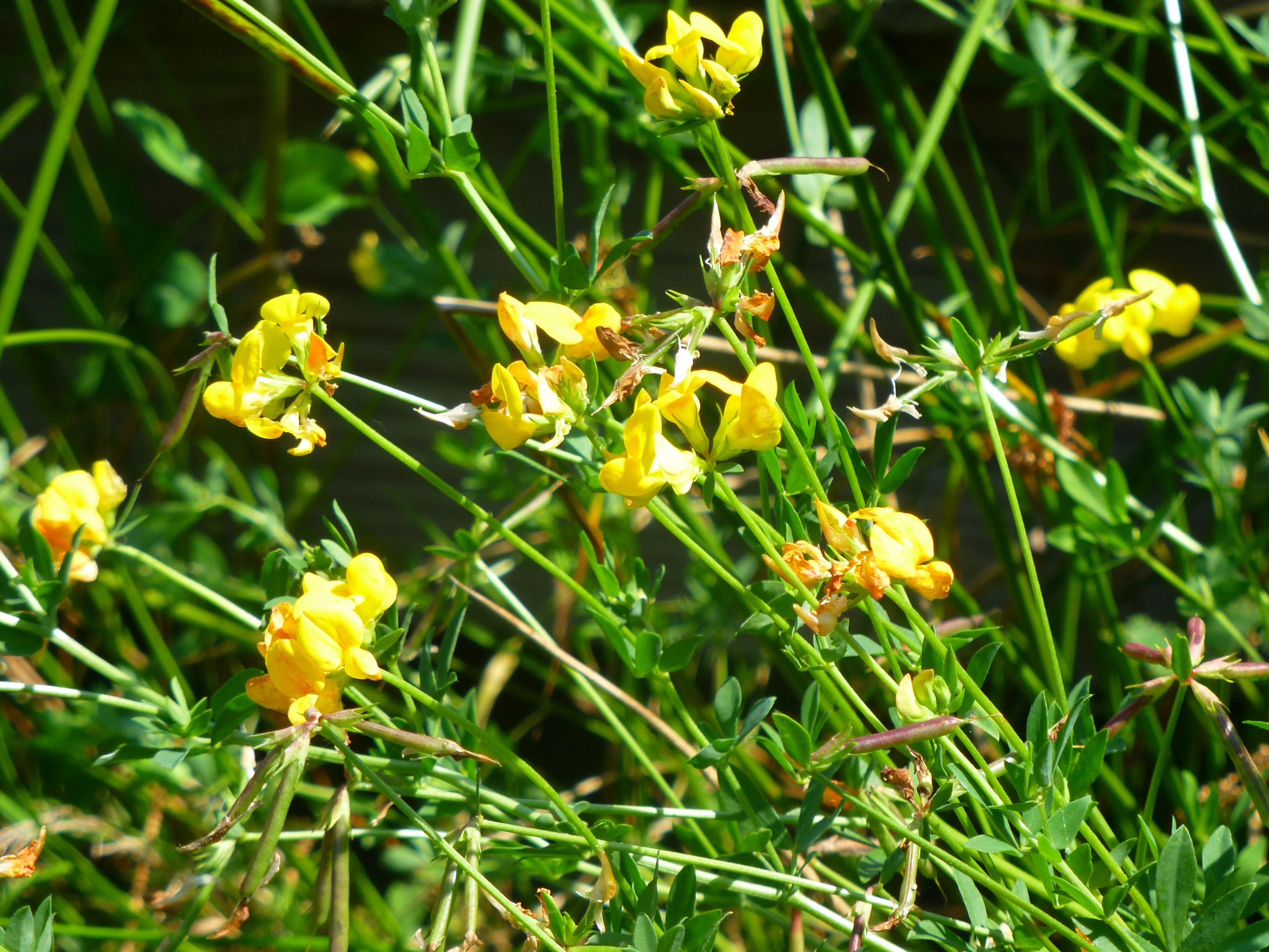 Lotier des marais au bord d'un étang : fleurs et fruits